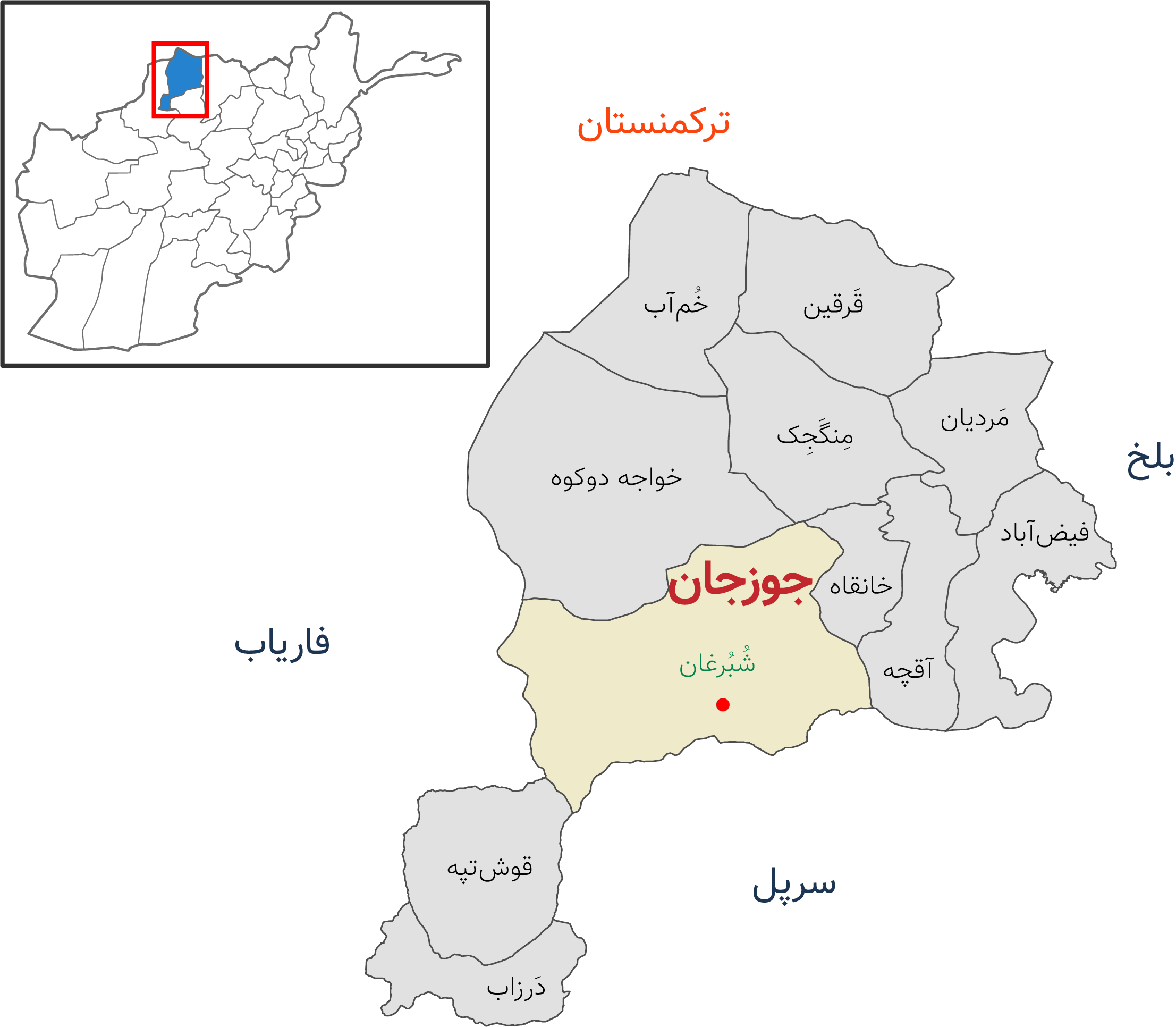 نقشه ولایت جوزجان